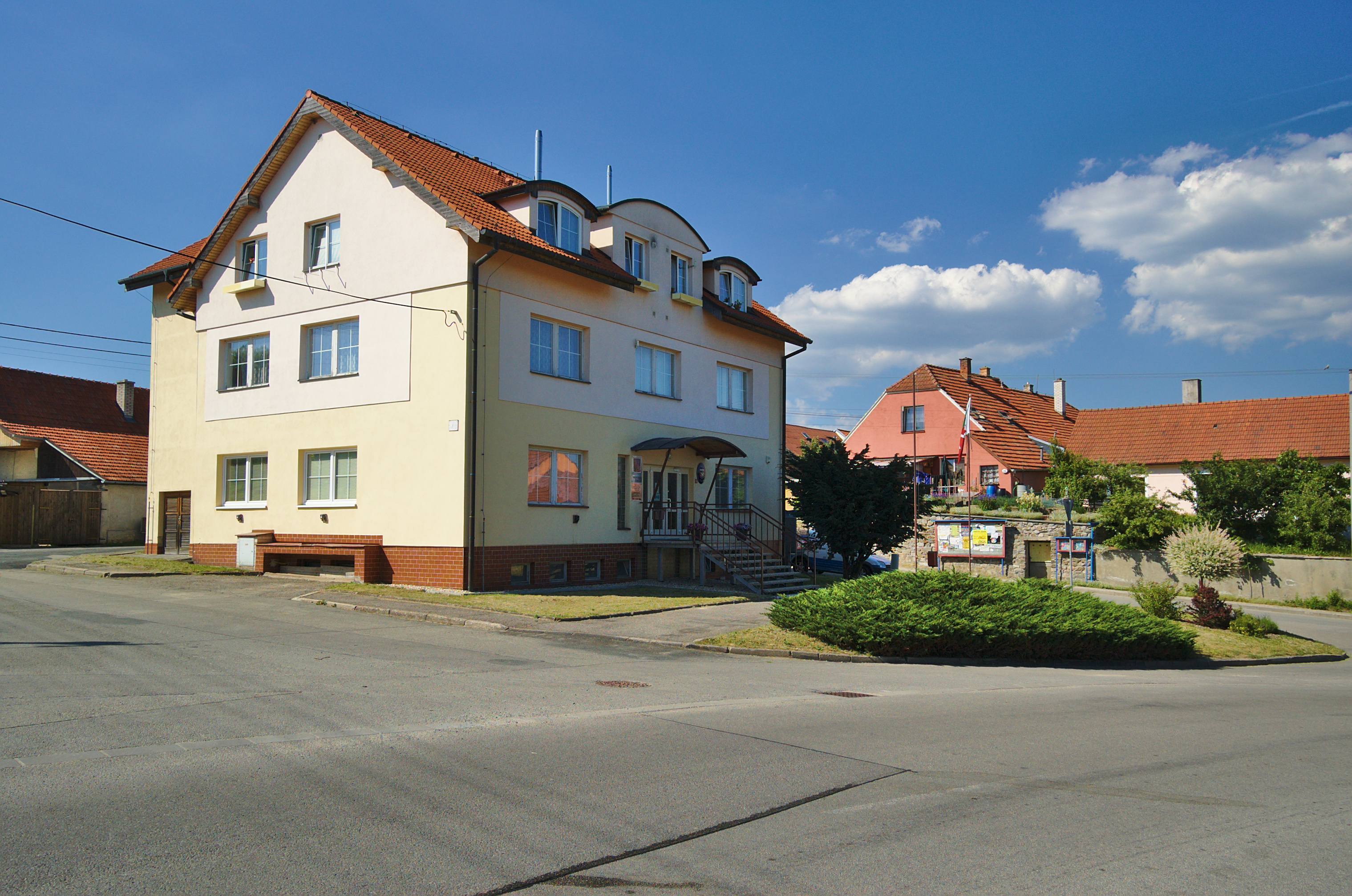 Obecní úřad, Žďár, okres Blansko